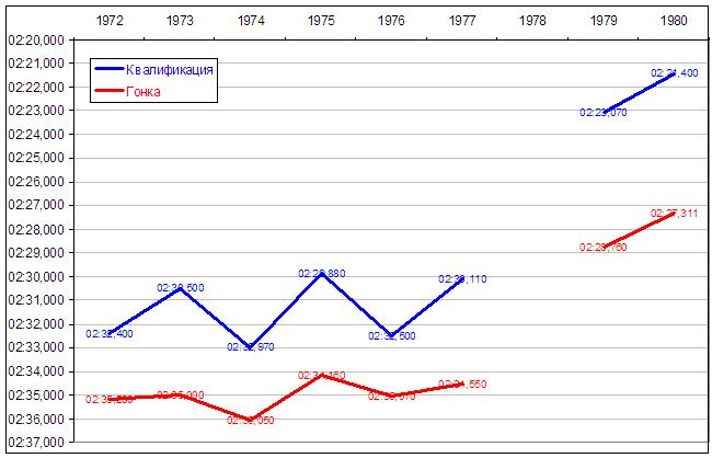 Сравнительный график времен на круге трассы Интерлагос за 1972-1980 годы.